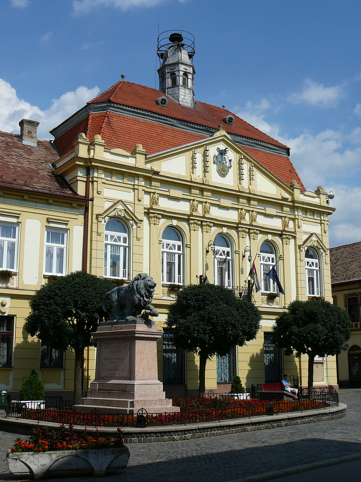 Városháza (Szigetvár, József Attila utca 1.) This is a photo of a monument in Hungary. Identifier: 1985